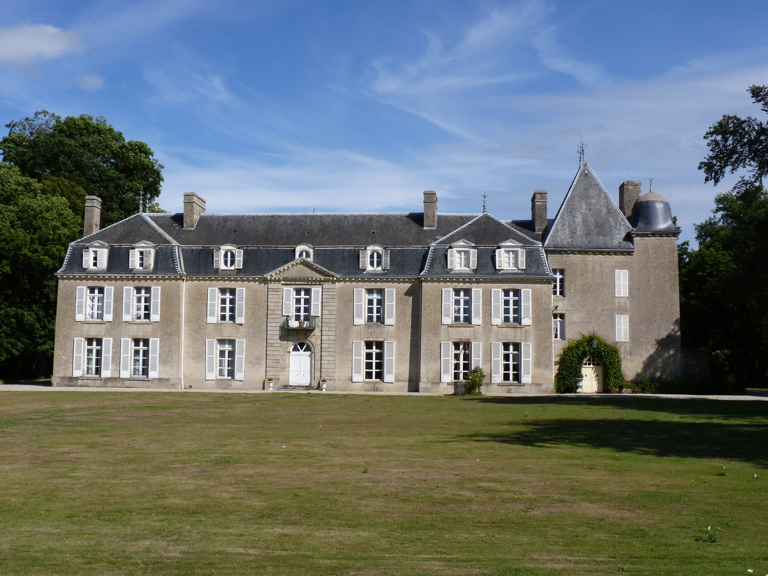 Château 16ème - 18ème siècles.